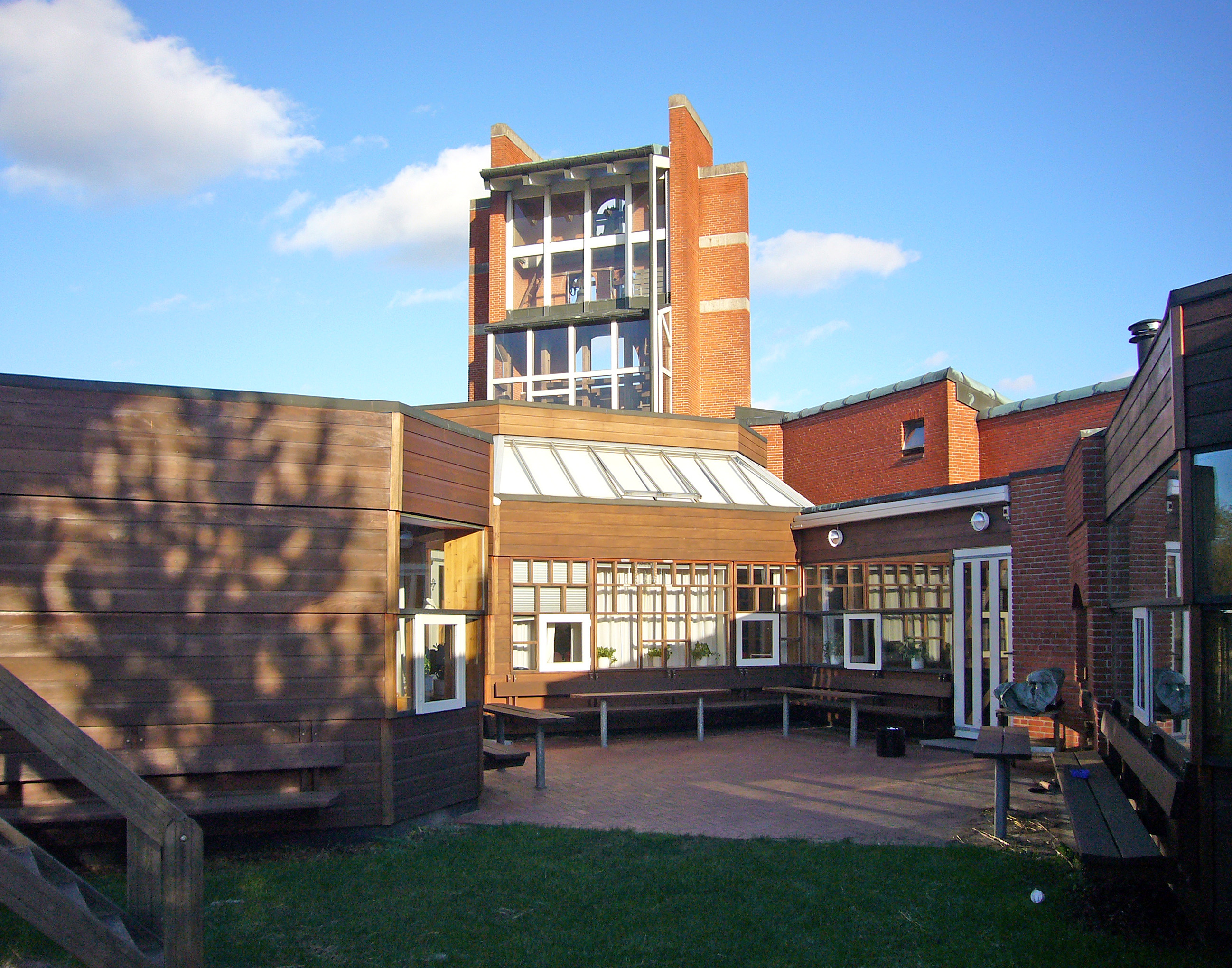 Karlslunde Strandkirke, Roskilde County, Denmark From kindergarten